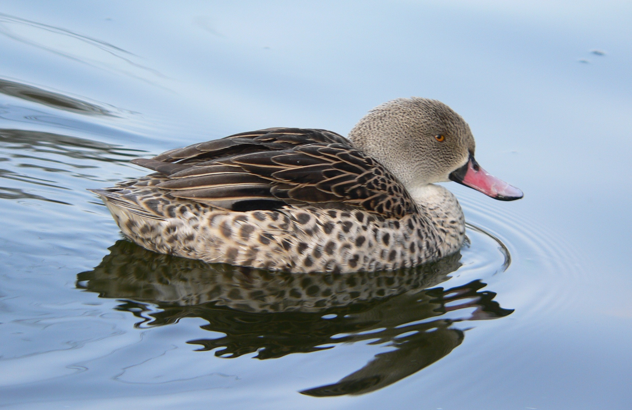 Anas capensis